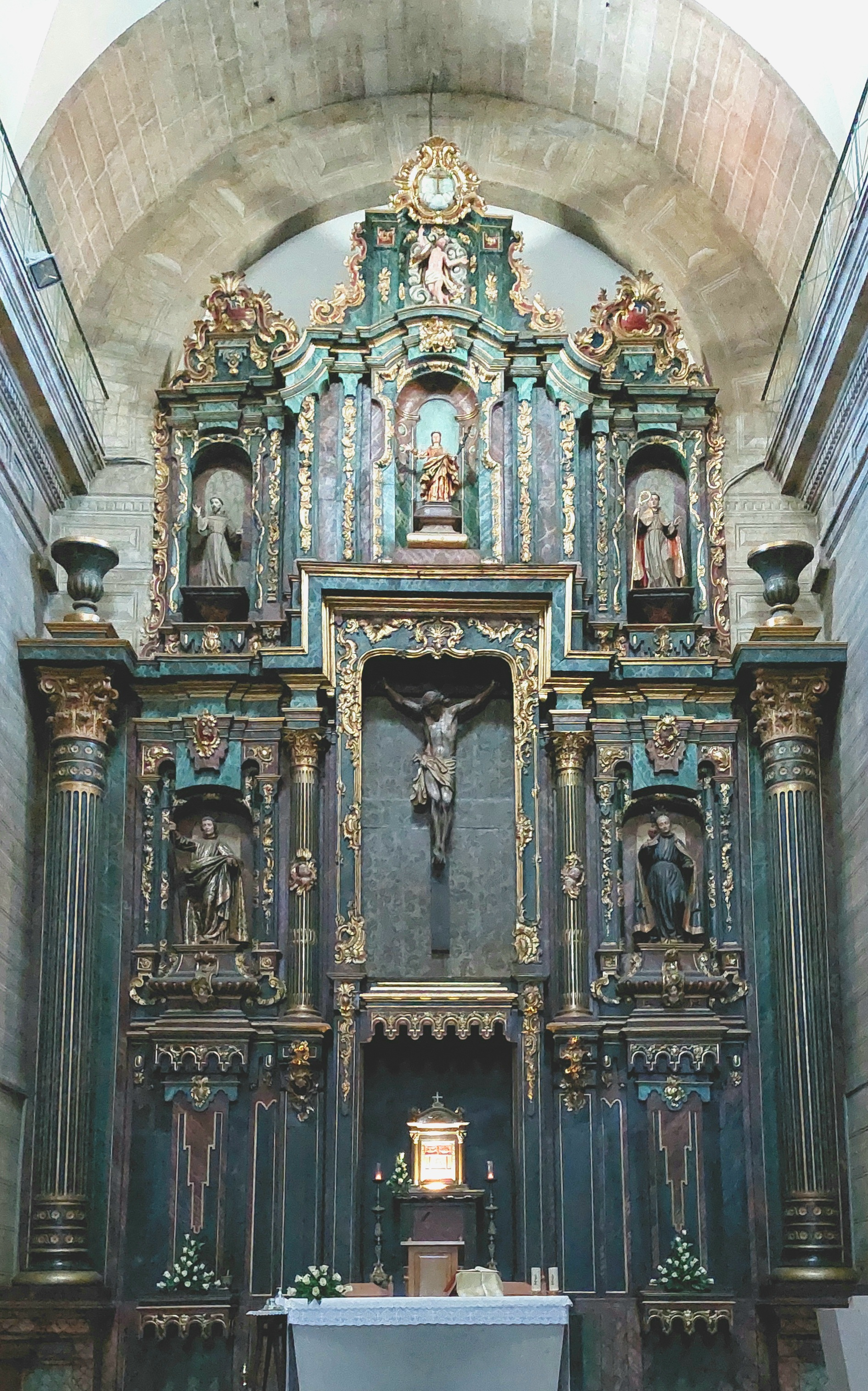 Retablo Mayor (Iglesia de Santa Eufemia, Ourense)